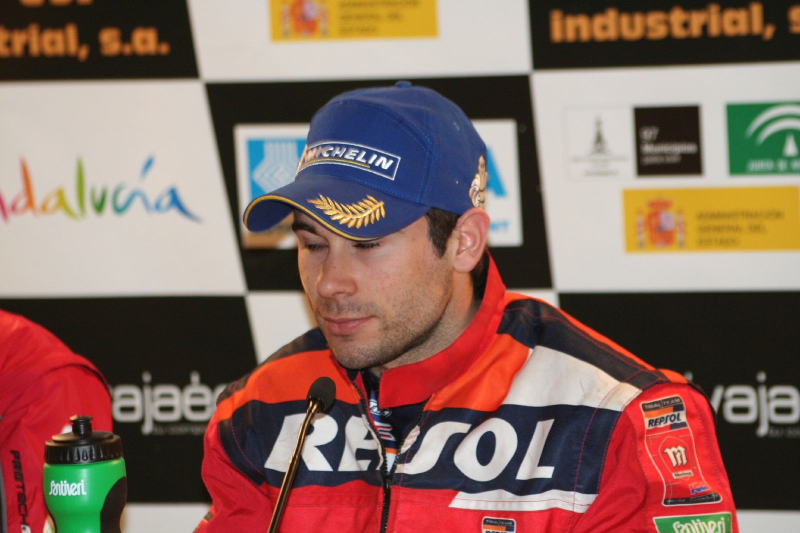 Toni Bou @ 2007FIM R1